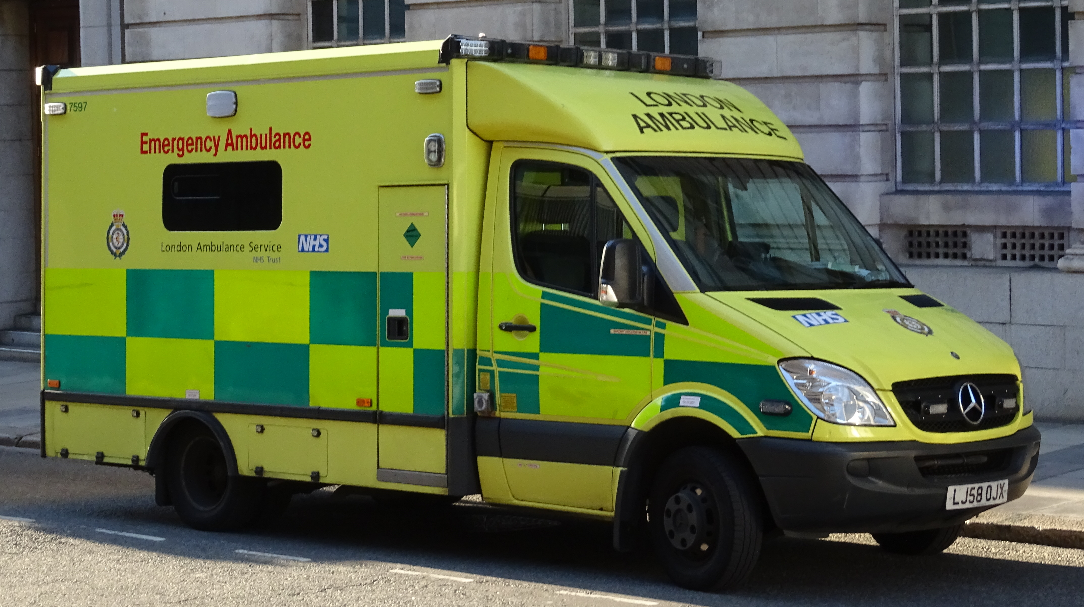 LJ58OJX LONDON AMBULANCE QUEEN VICTORIA STREET CITY OF LONDON